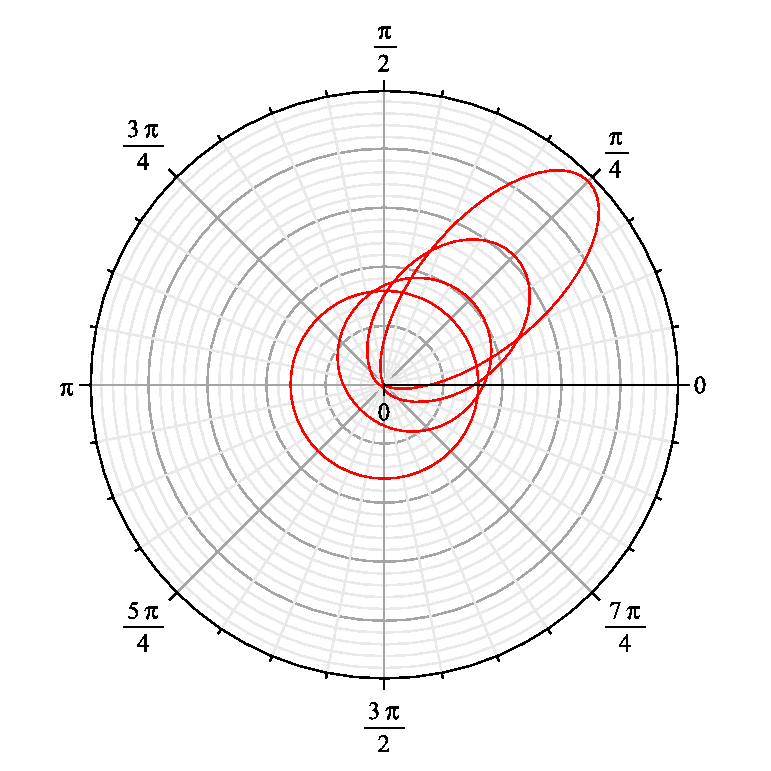 Distribution angulaire pour la méthode M1